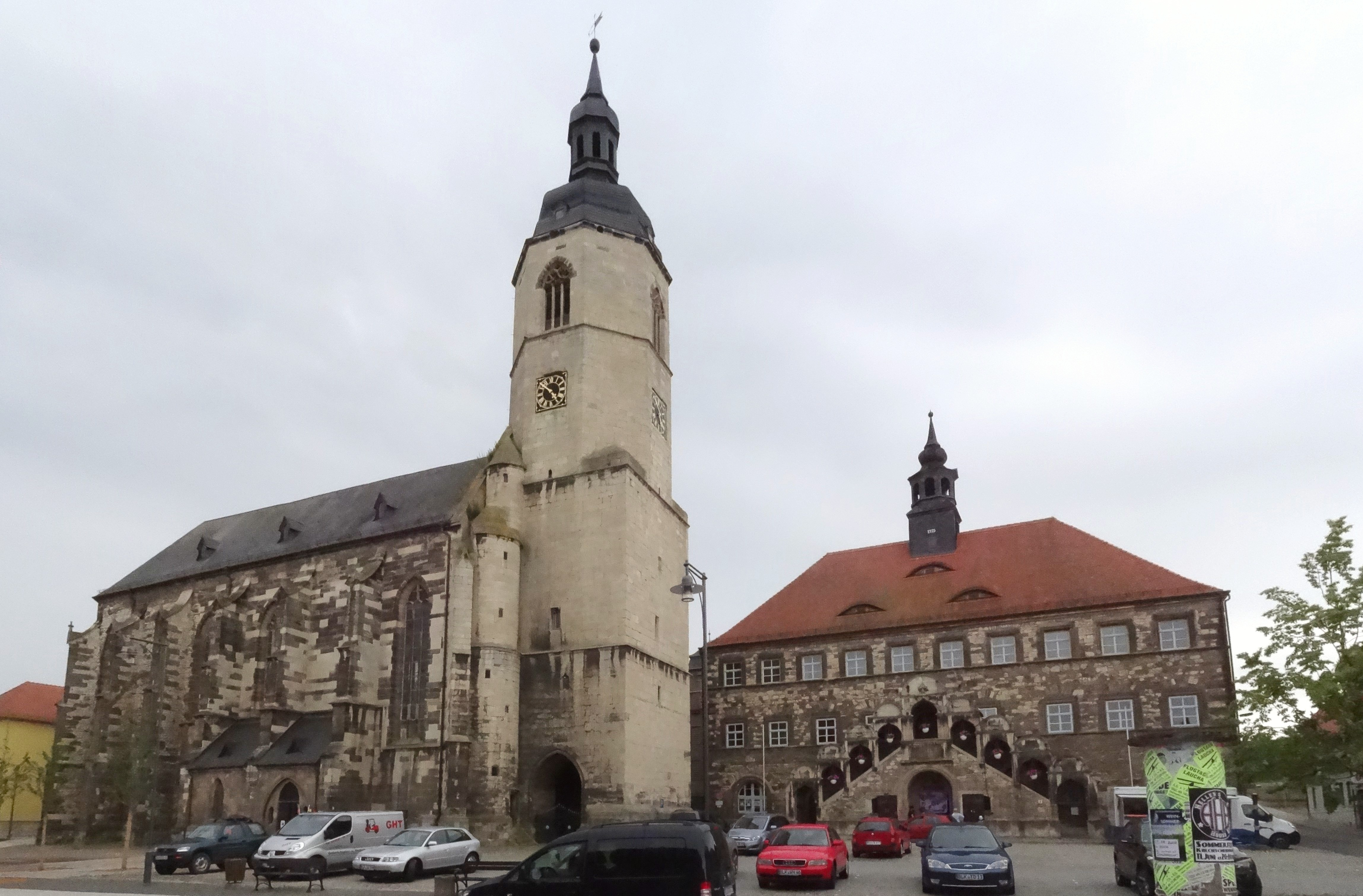 Marienkirche und Rathaus in Laucha an der Unstrut